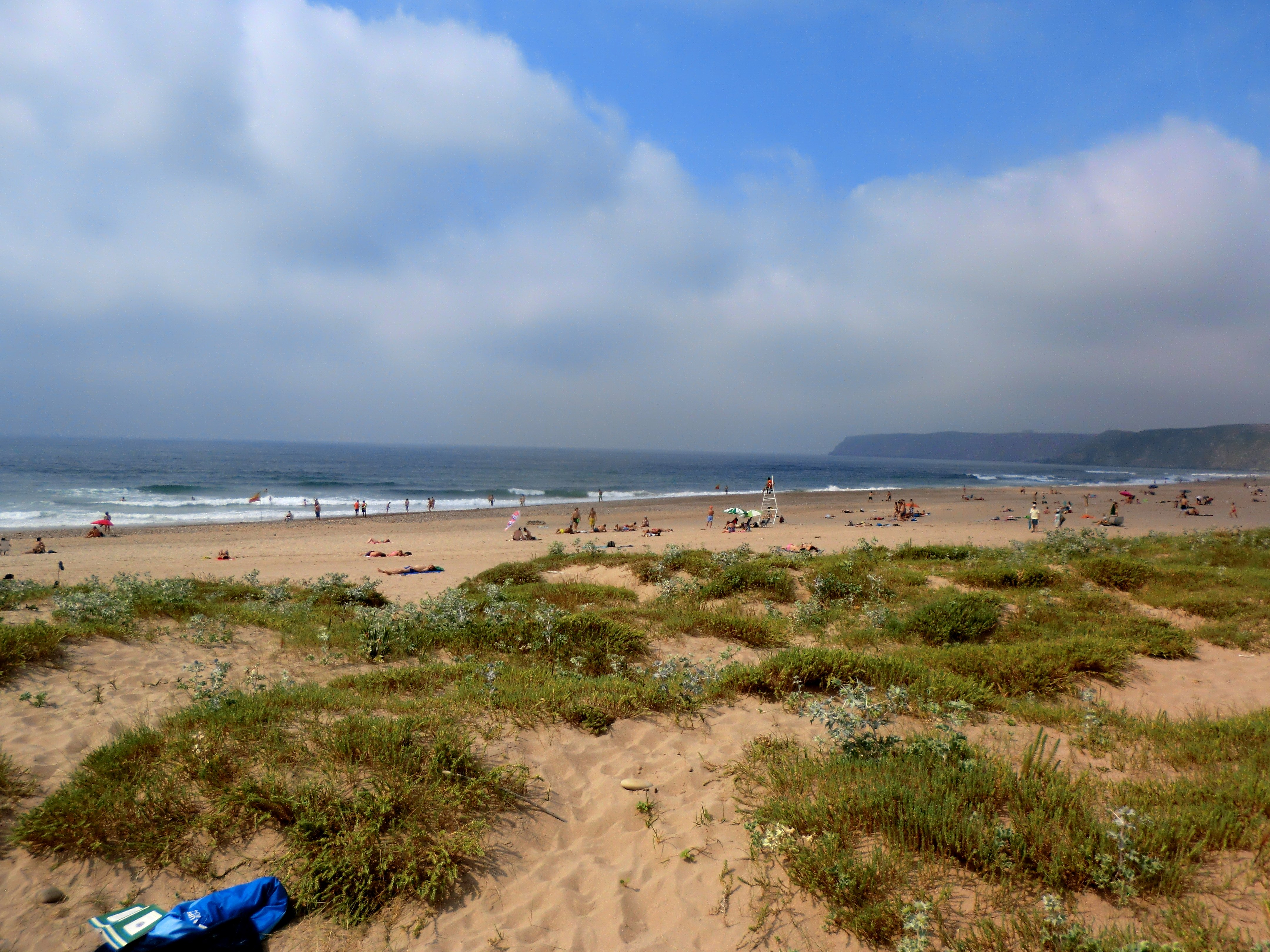 Xago Strand mittlerer Bereich